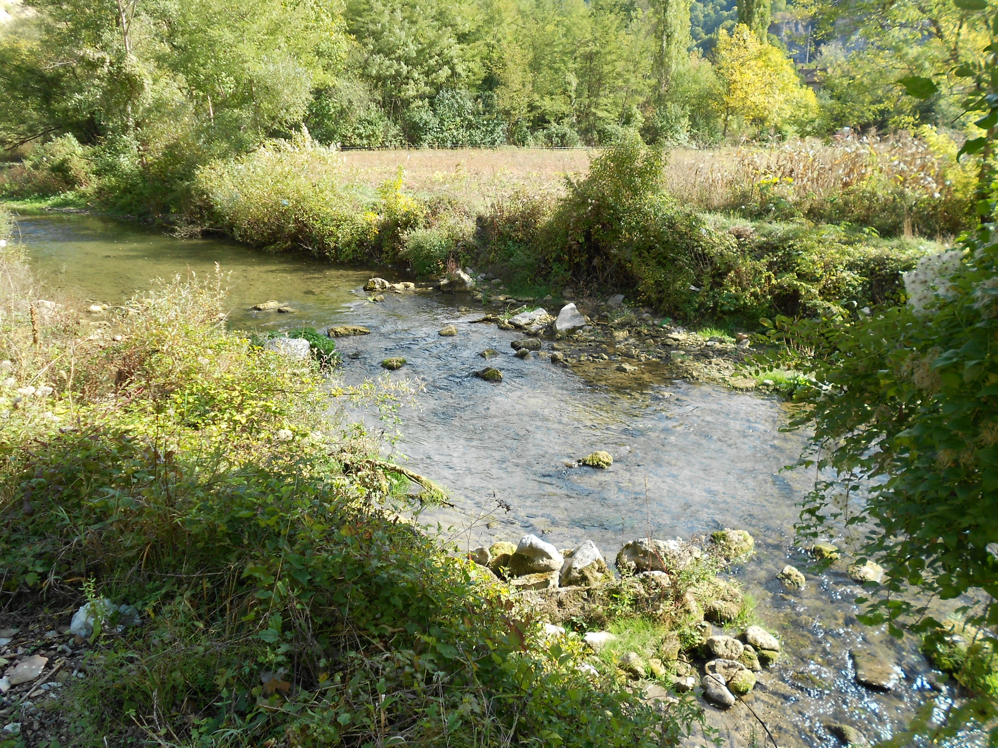 Lužnica nedaleko od sela Grnčar, oktobar 2011. Sopstvena slika, Dragan Cvetković, Niš.